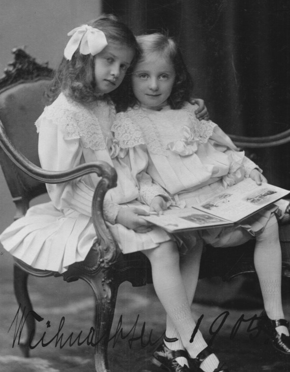 Dos hermanas muestran que viven muy en armonía y son felices. Más adelante en la RDA, este ya no será el caso y los niños a veces serán muy agresivos. Estos ya son personajes aquí en la imagen. En comparación con ahora, no piensan en nada malo y no engañan. No se preocupan por su destino como los corderos.